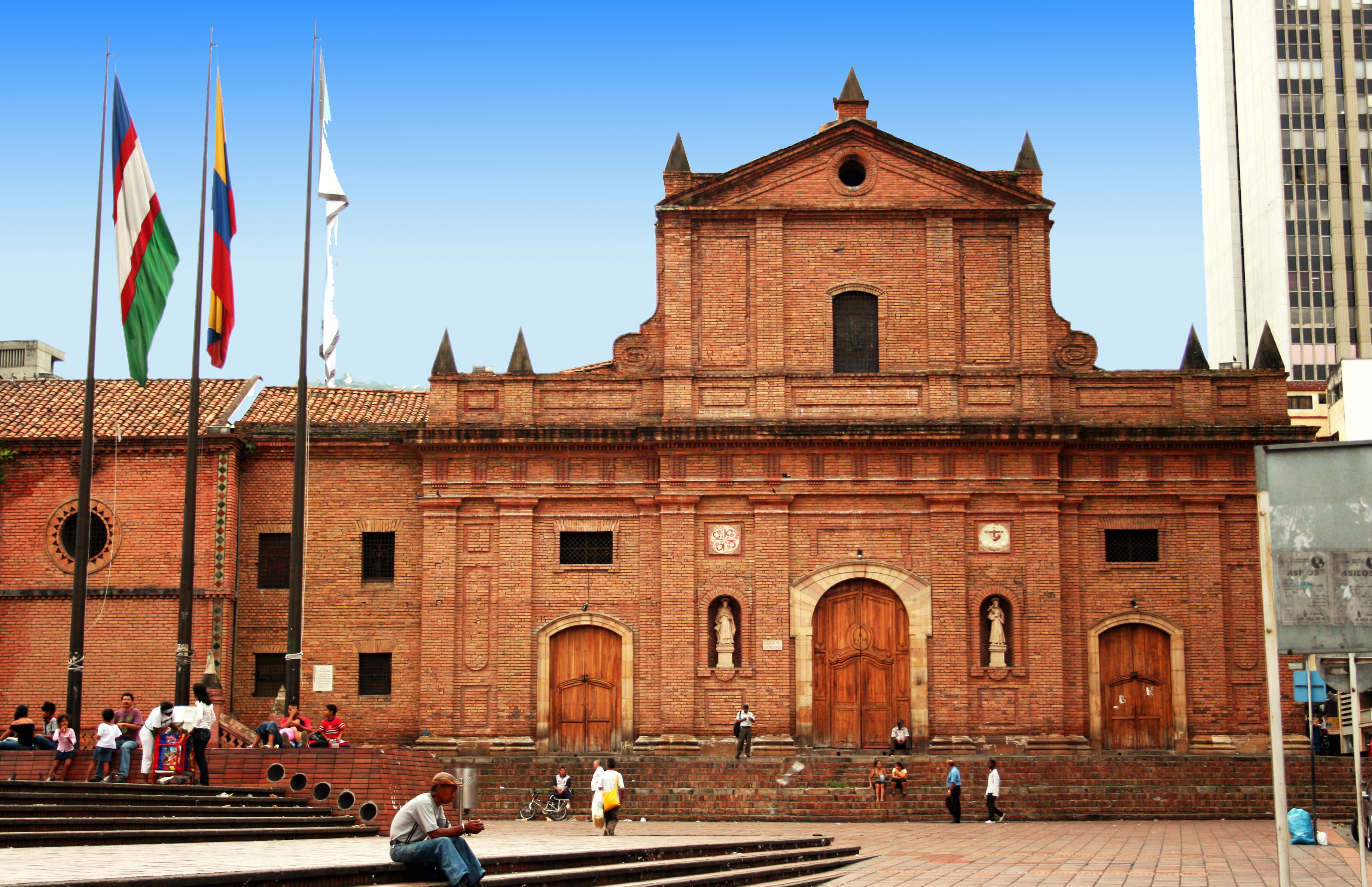 Iglesia de San Francísco, Cali, Colombia